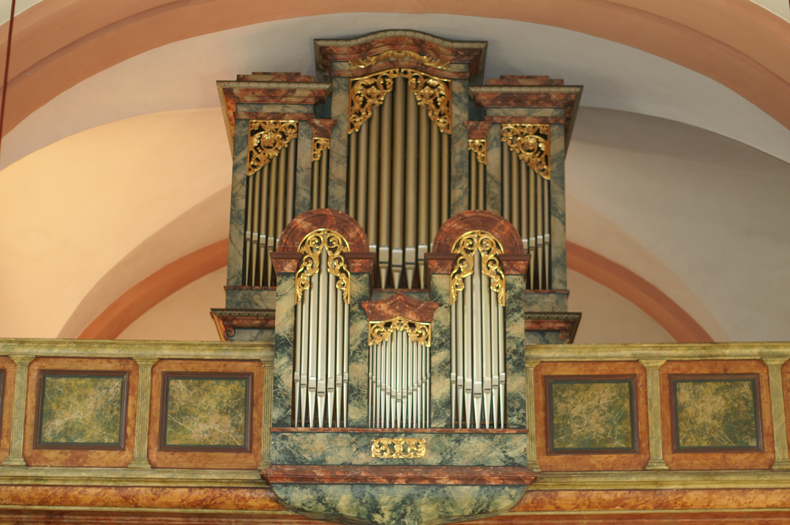 Kath. Pfarrkirche, Kirchhof/Friedhof ehemaliger, Kath. Pfarrkirche hl. Veit und ehem. Friedhof